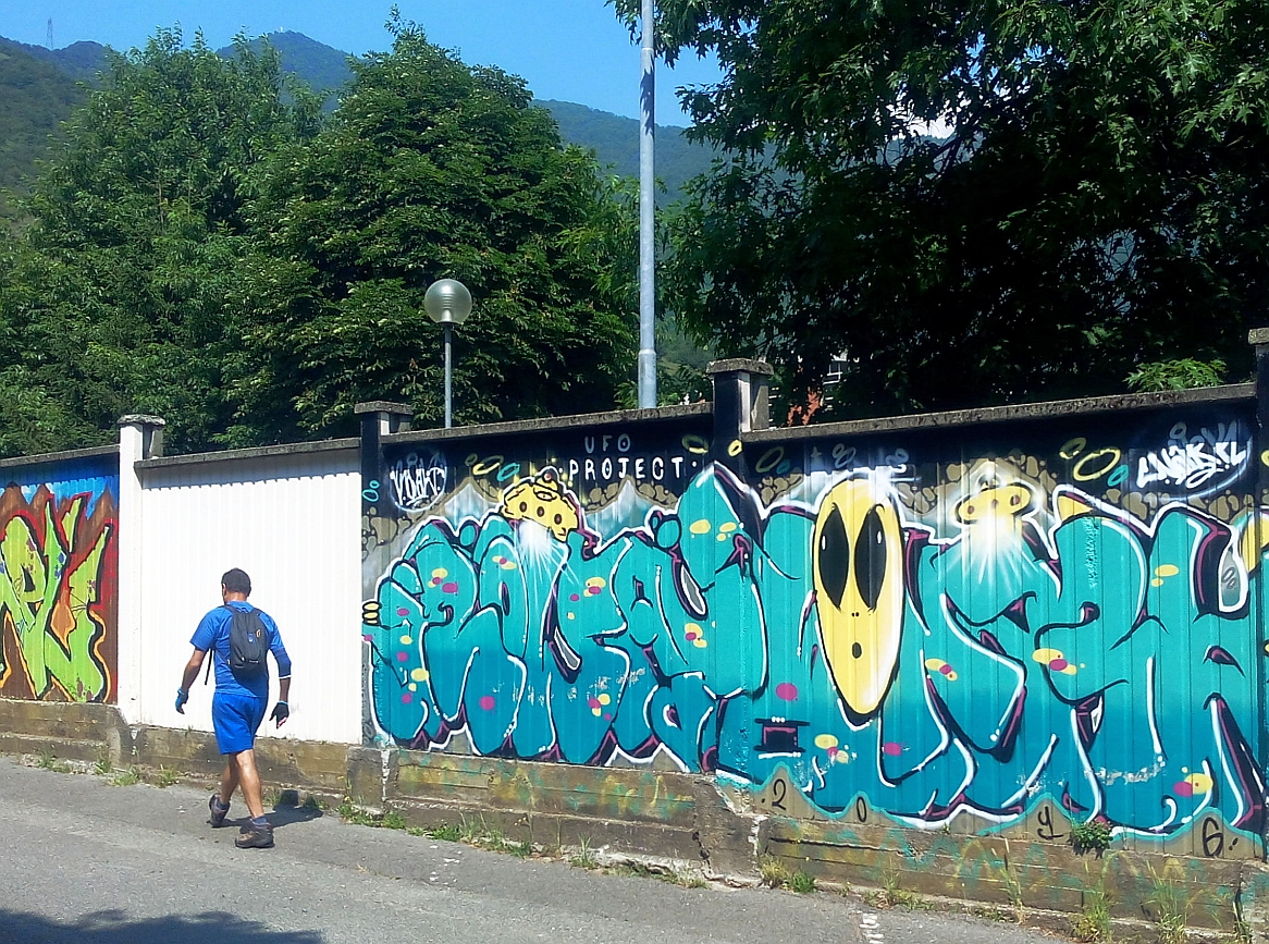 Musinè (Alpi Graie): graffiti ufologici alla base della montagna This is a photography of Natura 2000 protected area with ID IT1110081